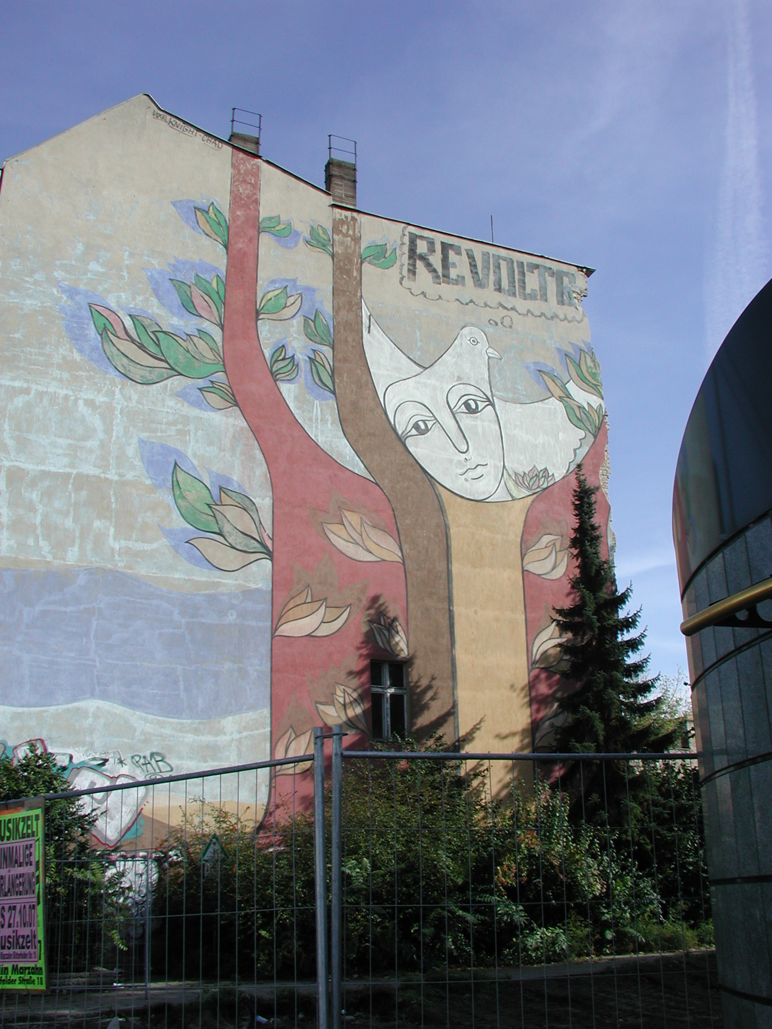 Südseite Antonplatz in Berlin-Weißensee, Bemalter Giebel an Hauswand Berliner Allee